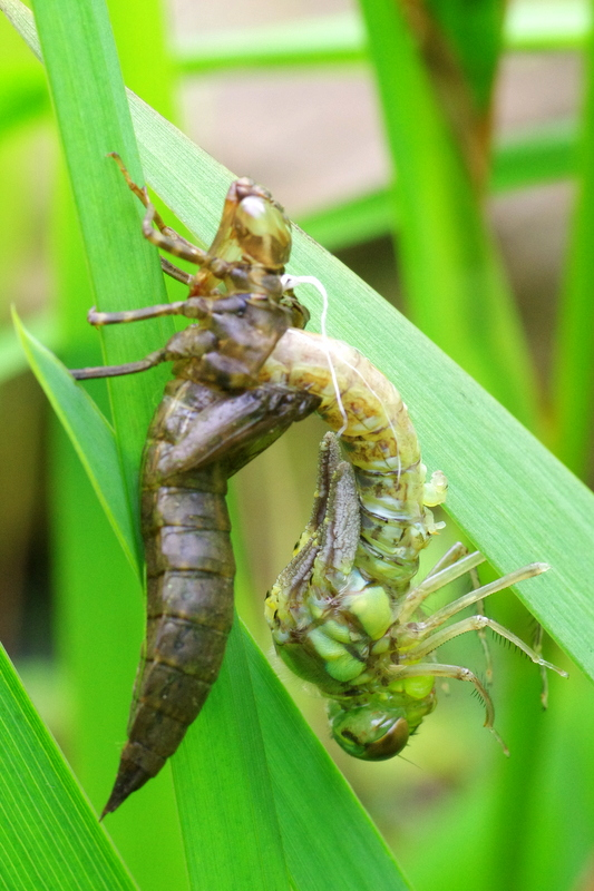 Żagnica sina (Aeshna cyanea) - przeobrażenie. Przez pęknięcie na grzbiecie wysuwa się tułów, głowa imago, skulone skrzydła i nogi.